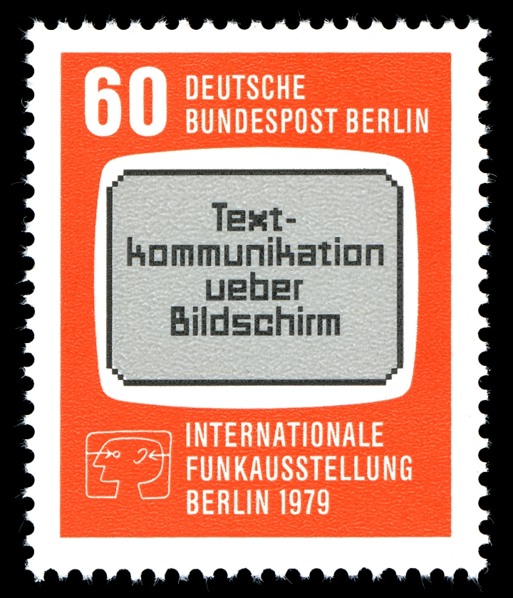 German stamp